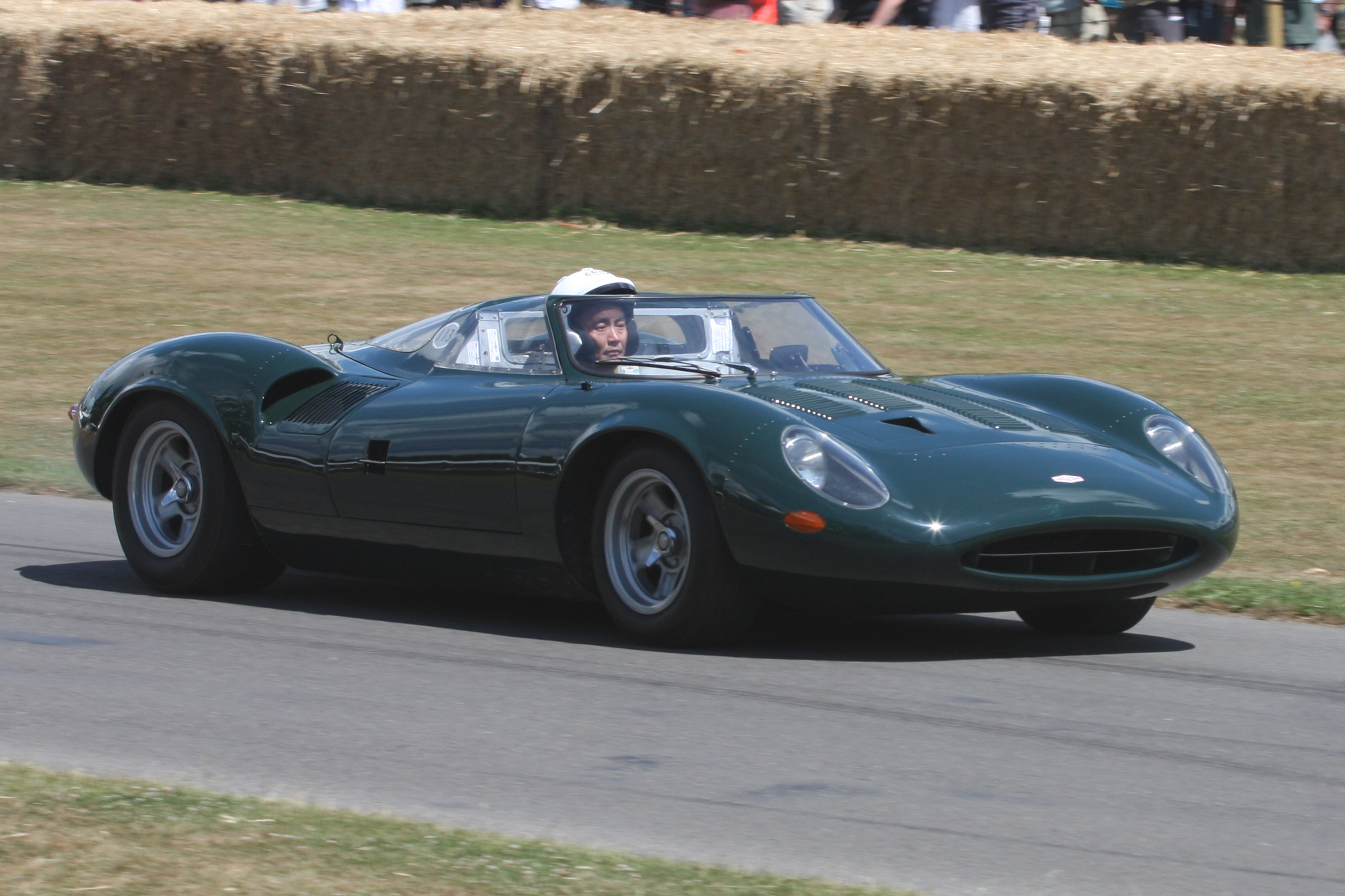 1966 Jaguar XJ13